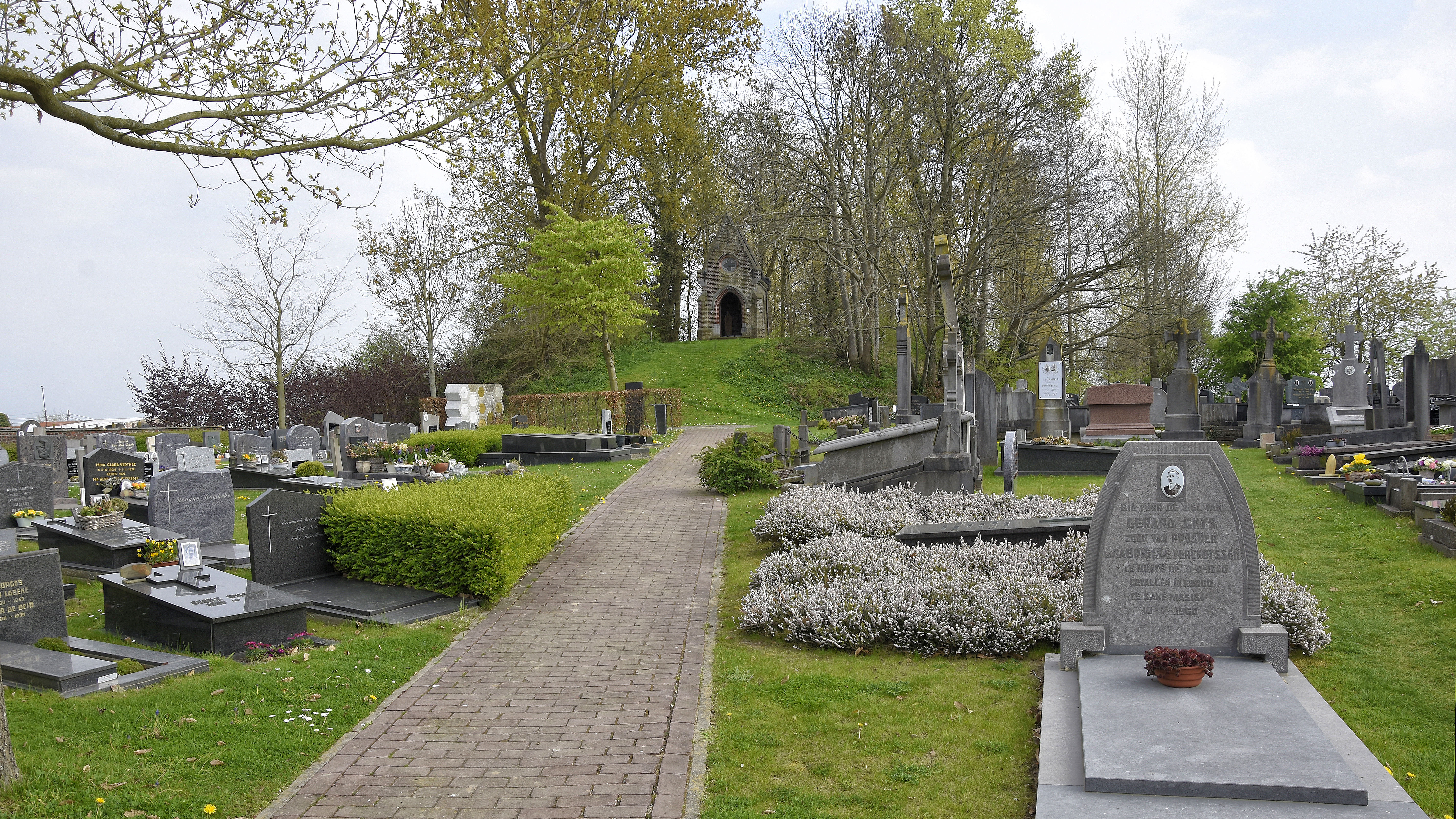 Oud Kerkhof te Munte, België of Kerkenhoek, met achteraan de motteheuvel en de kapel